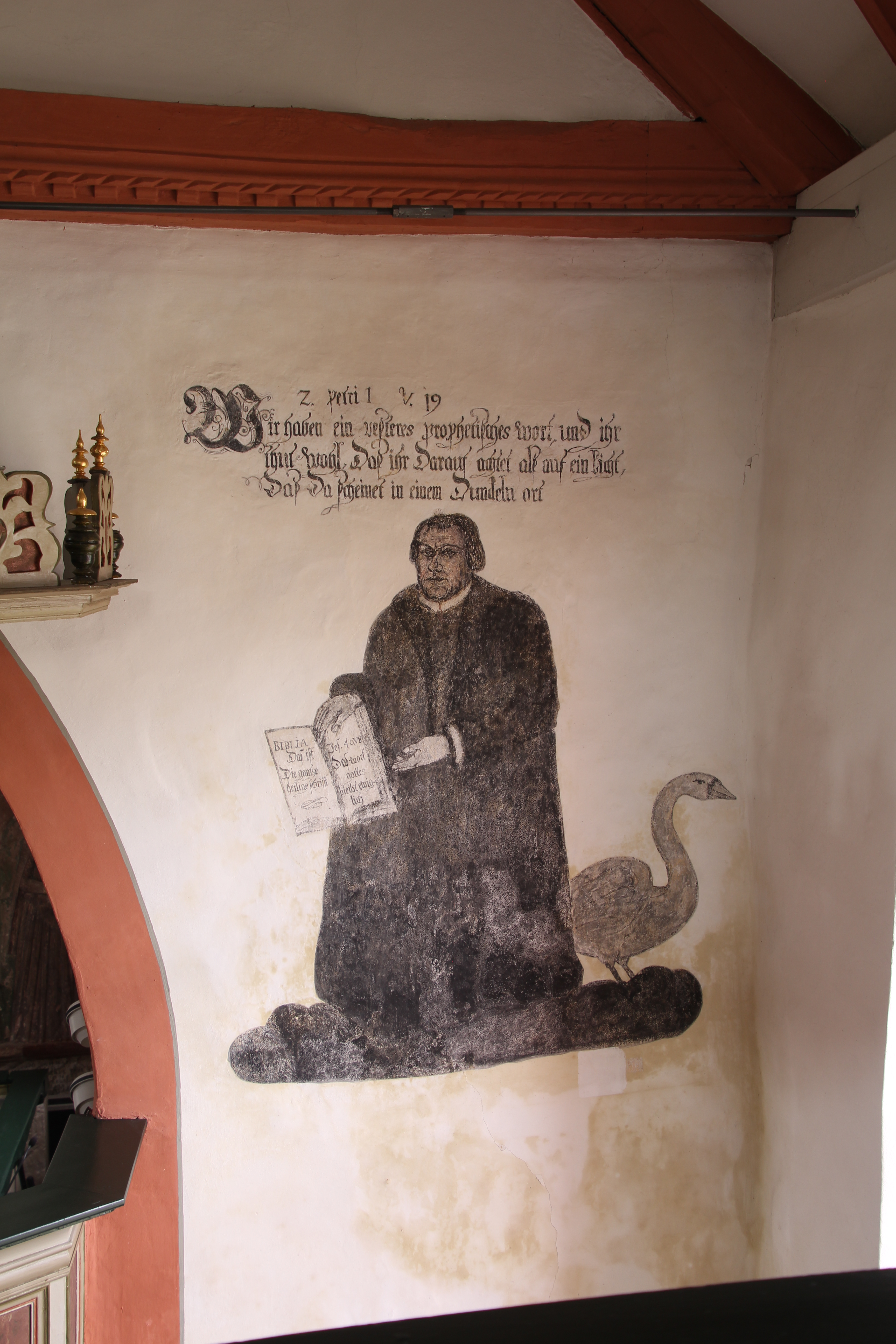 Siehe Bild und Dateiname